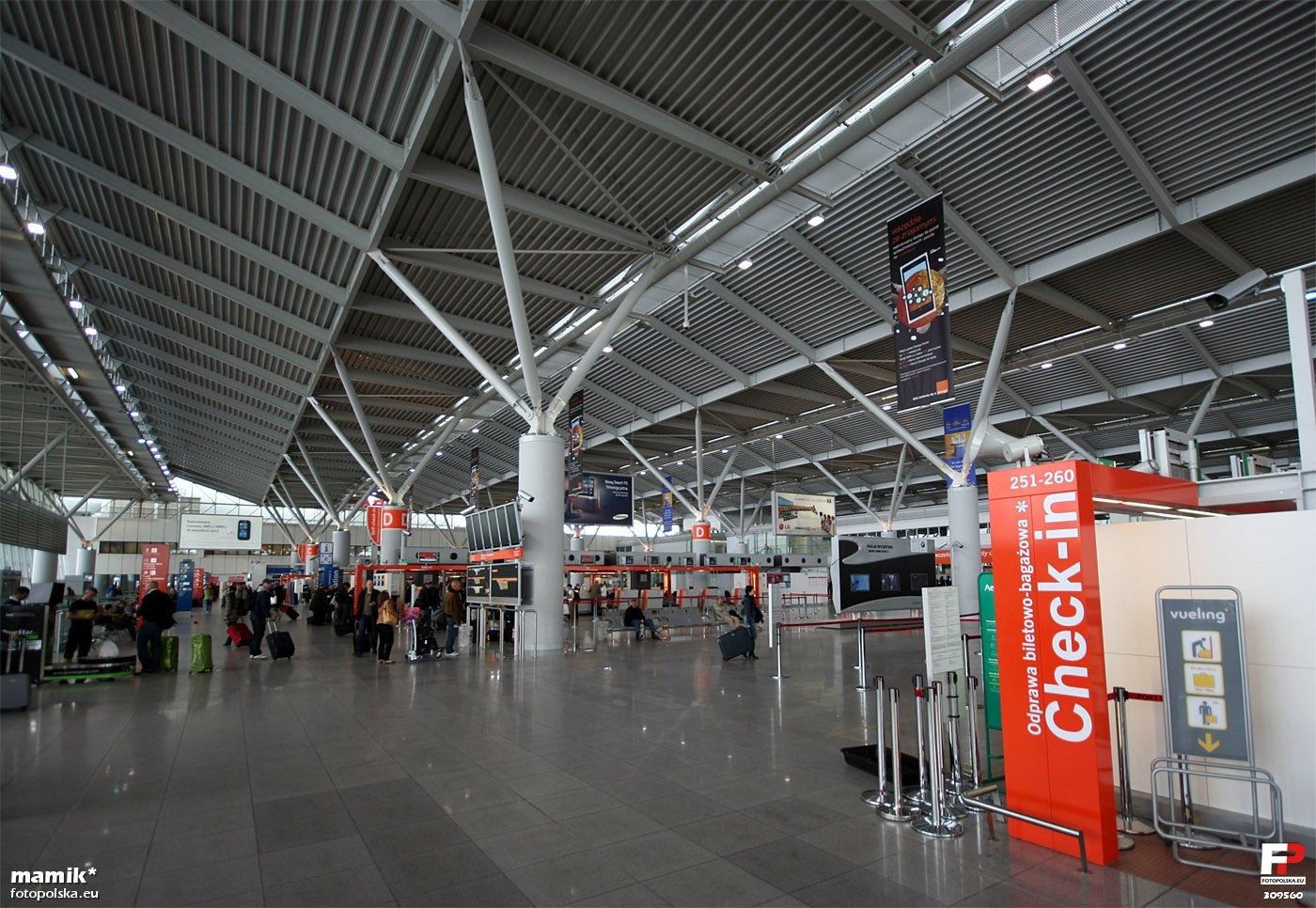 Ogólnodostępna hala odlotów czyli tzw. stanowiska check-in